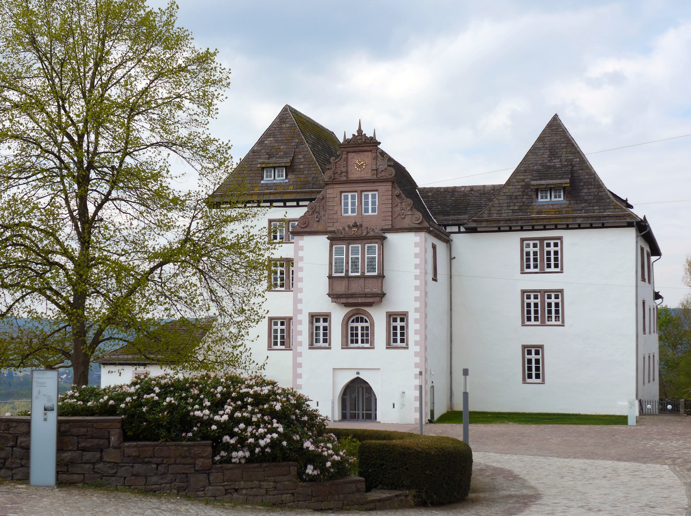 Museum Fürstenberg im Frühjahr